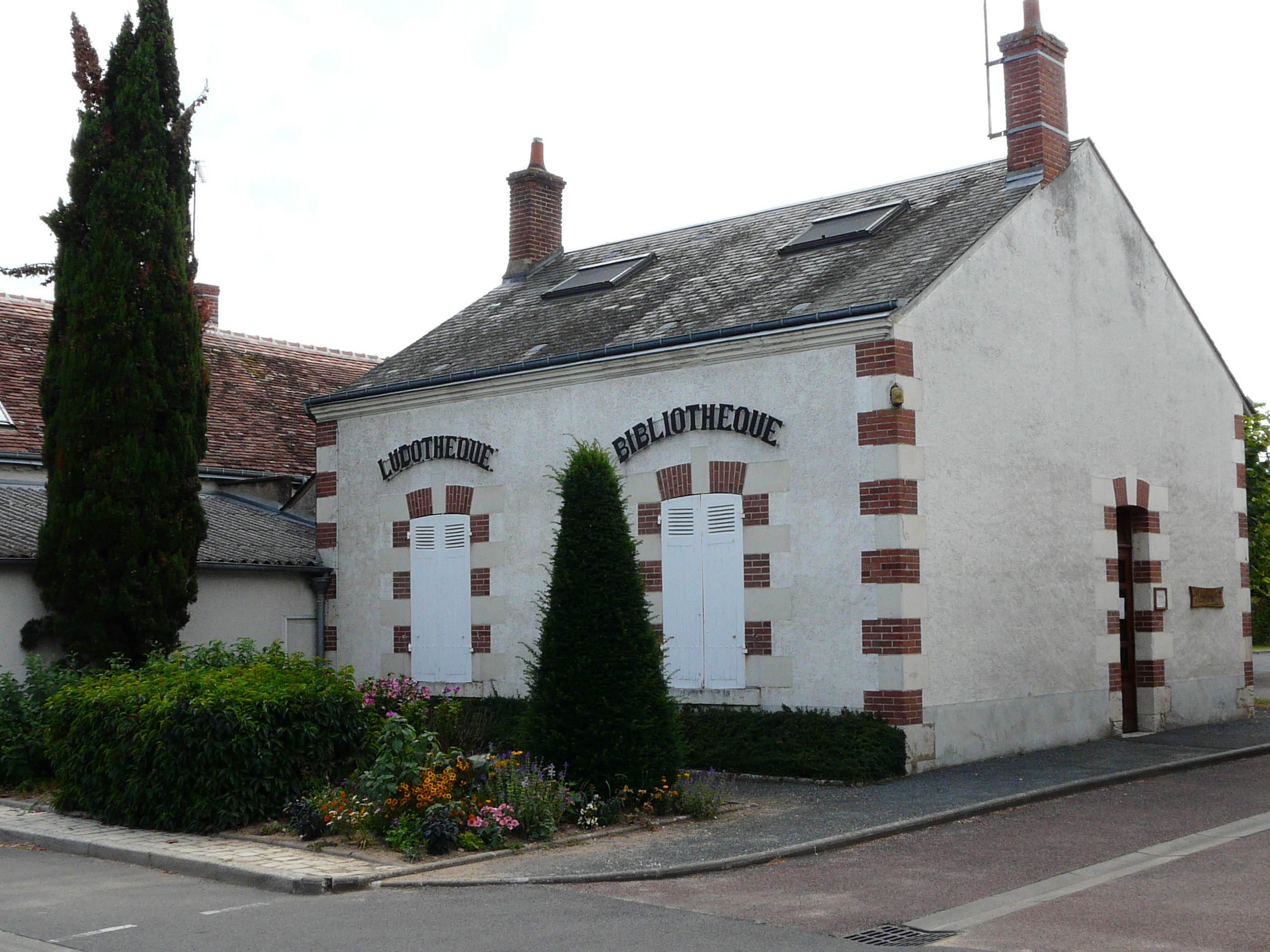 ludo-bibliothèque de Saint-Gervais-la-Forêt